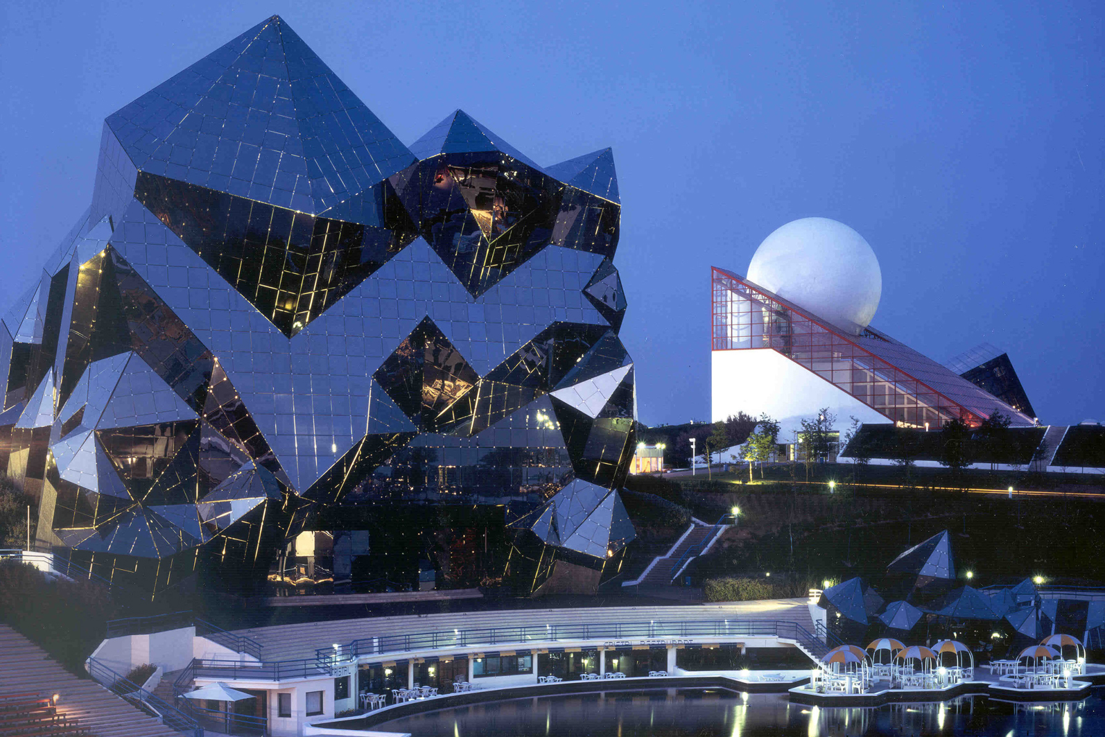 Le Kinémax, bâtiment phare du Parc du Futuroscope, conçu par Denis Laming